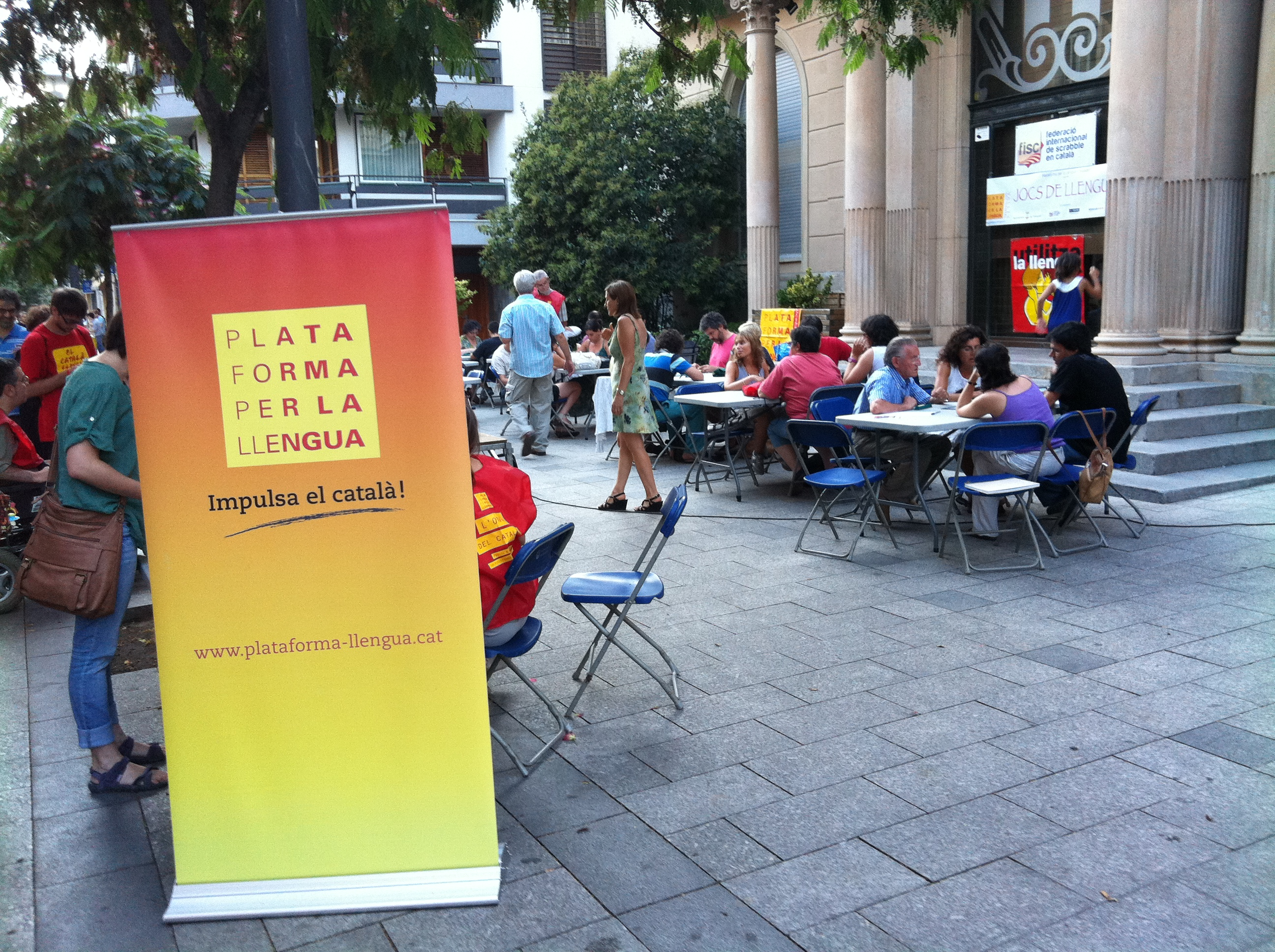 Sabadell